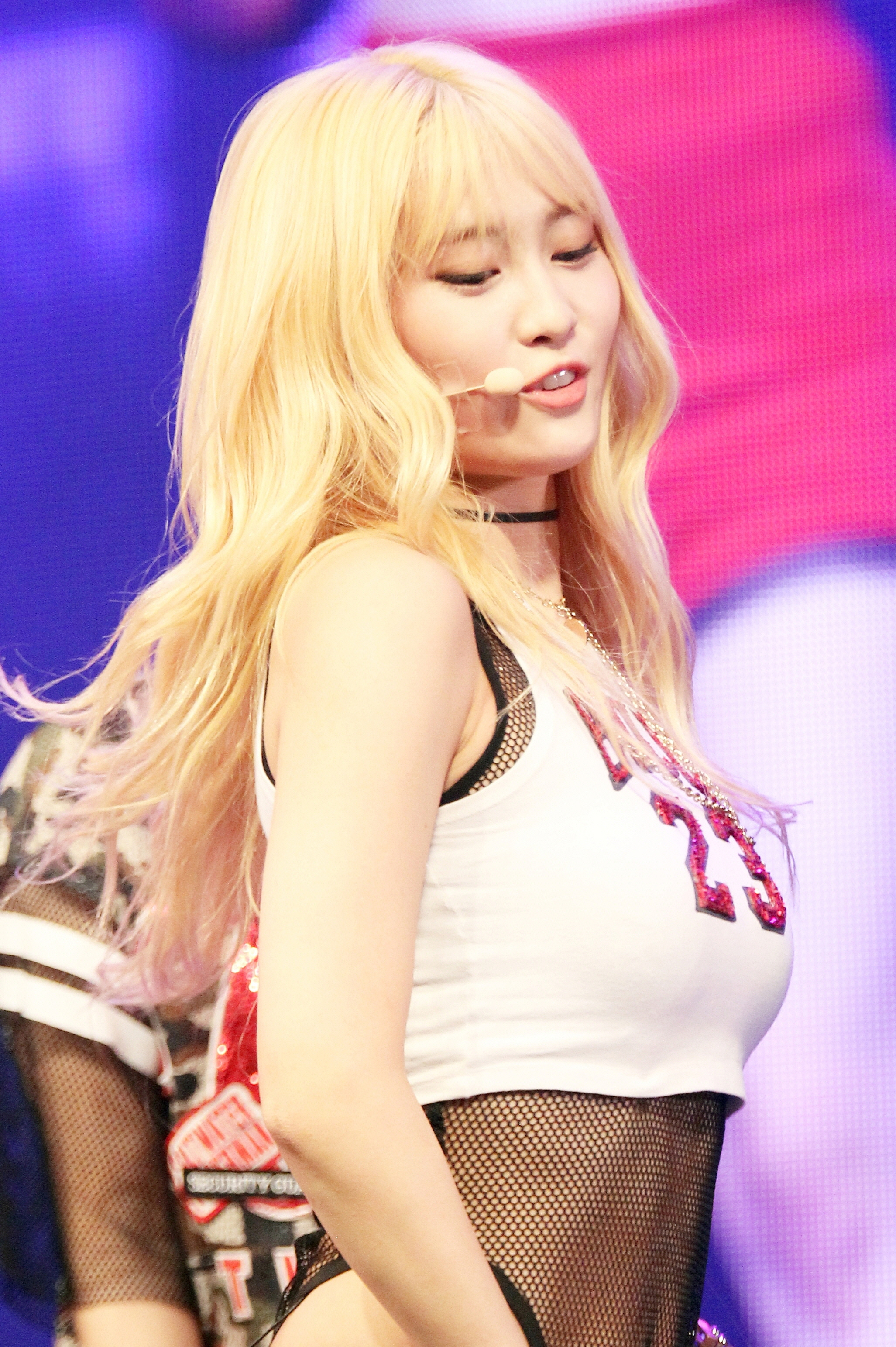 151020 트와이스 - 데뷔 쇼케이스 TWICE - Debut Showcase